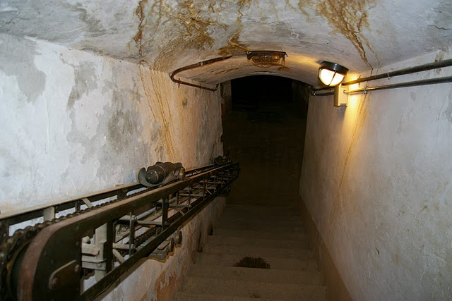 Roberto Manfredi, utente Riotforlife, foto personale scattata a Colico